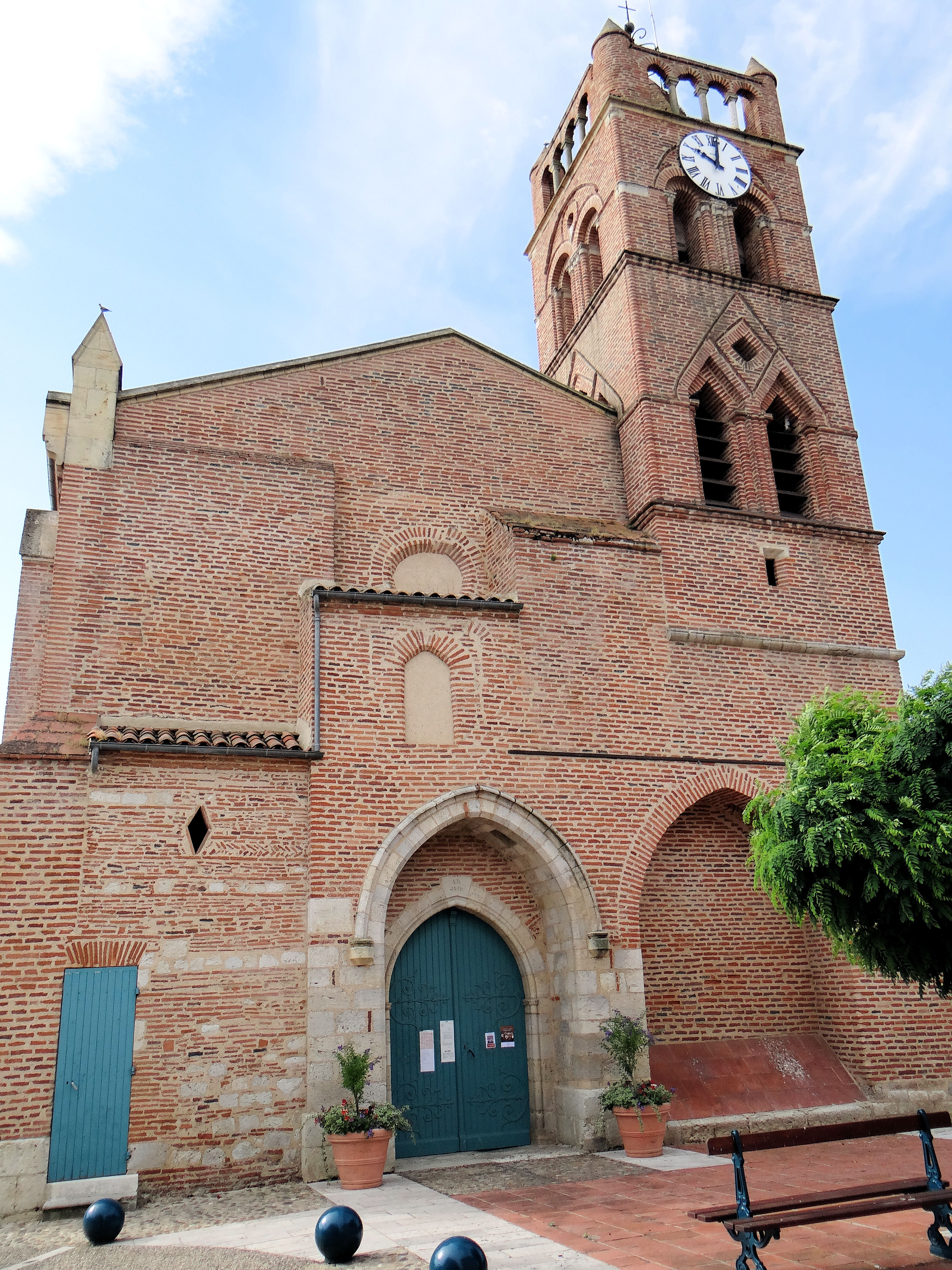 Donzac - Église de l'Assomption - Façade occidentale